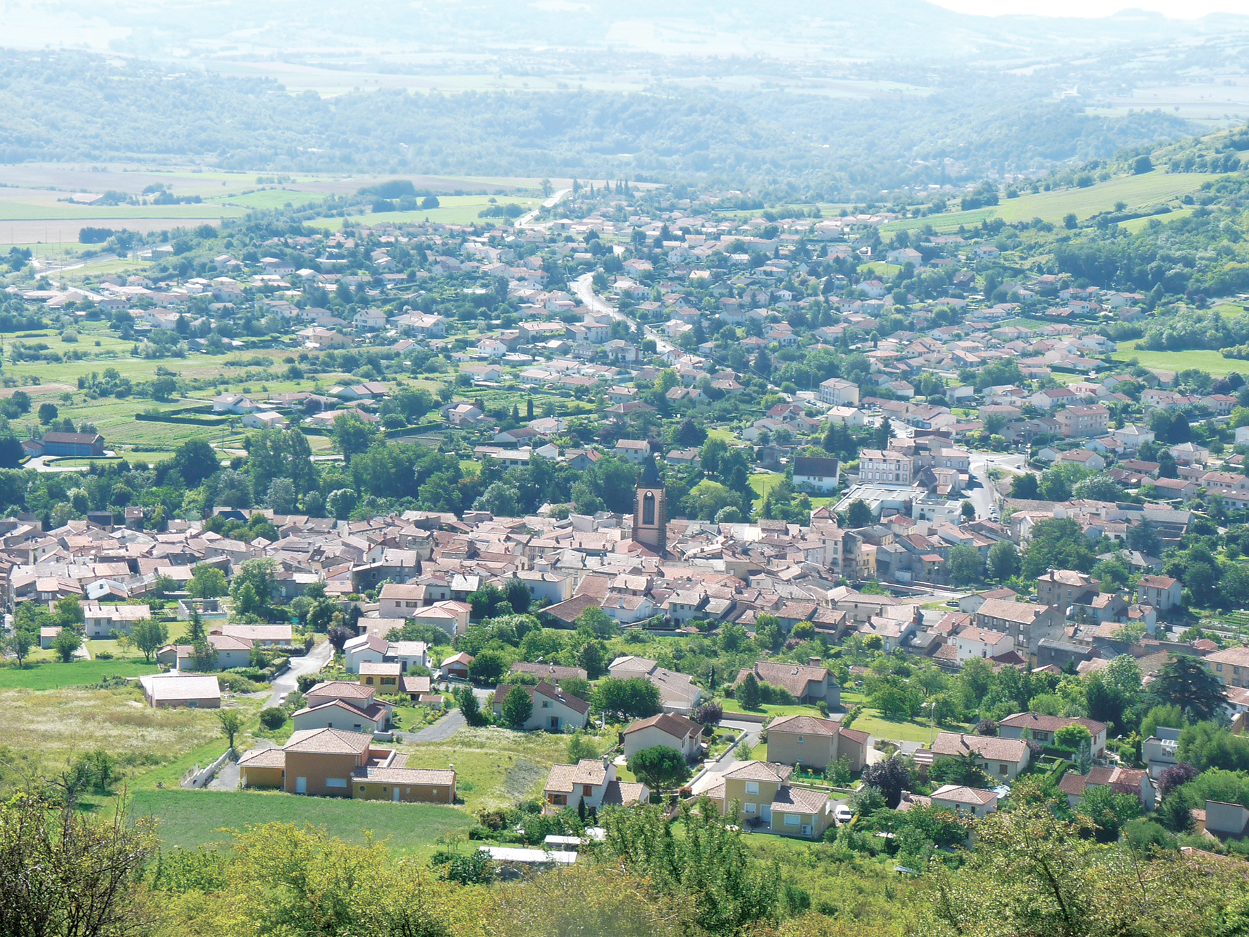 Vue aérienne des Martres-de-Veyre